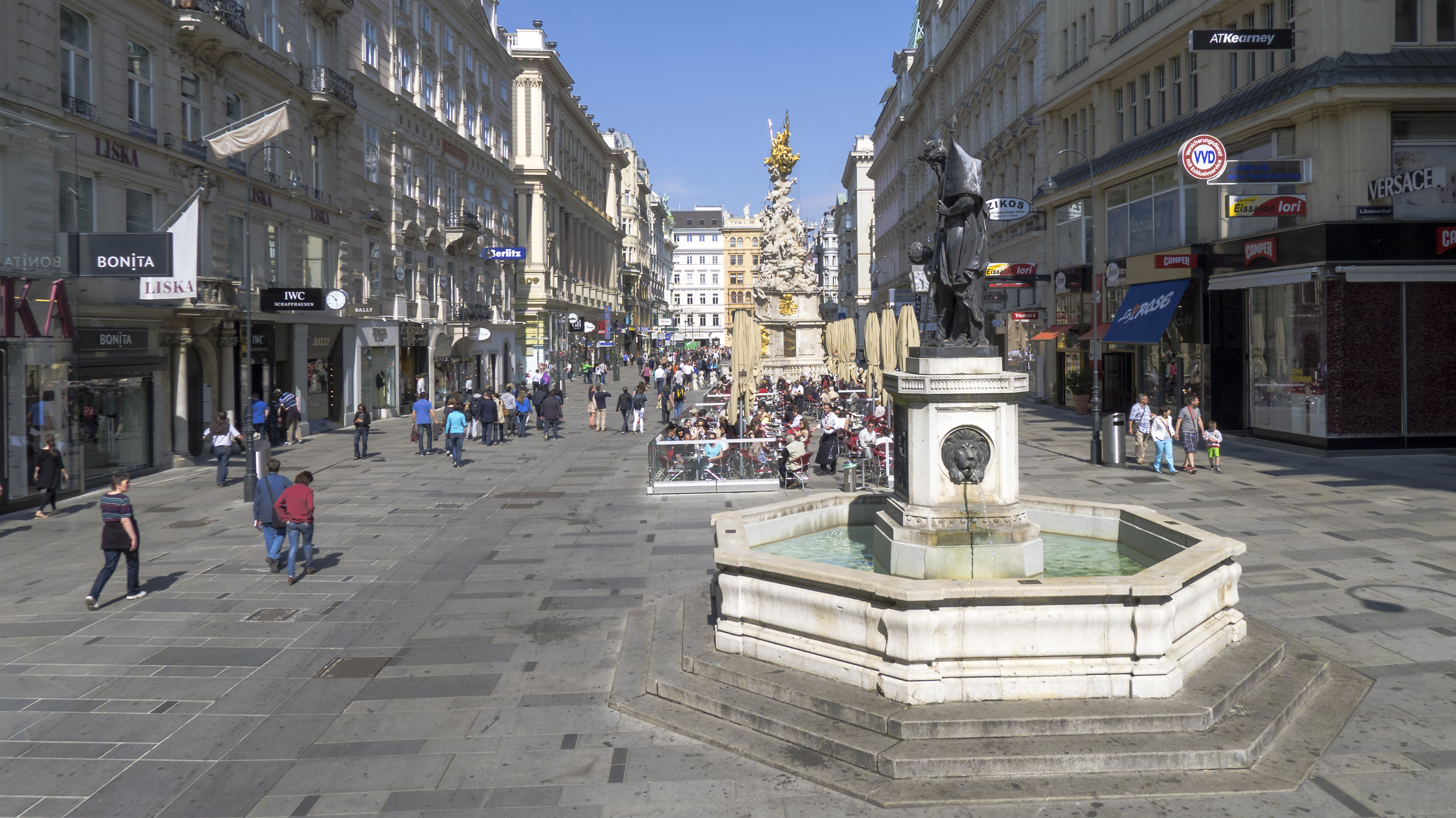 Graben in Wien 1 bei Nr. 28 Richtung Nordwesten